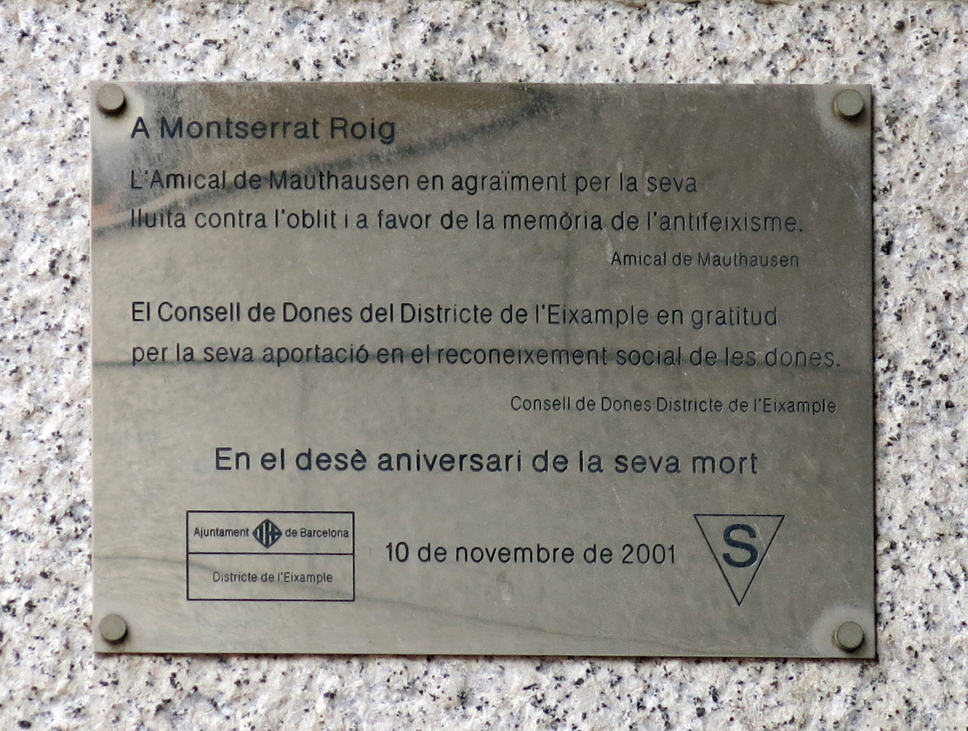 Montserrat Roig. Jardins Montserrat Roig, accés per c. Rosselló, 484 (Barcelona)